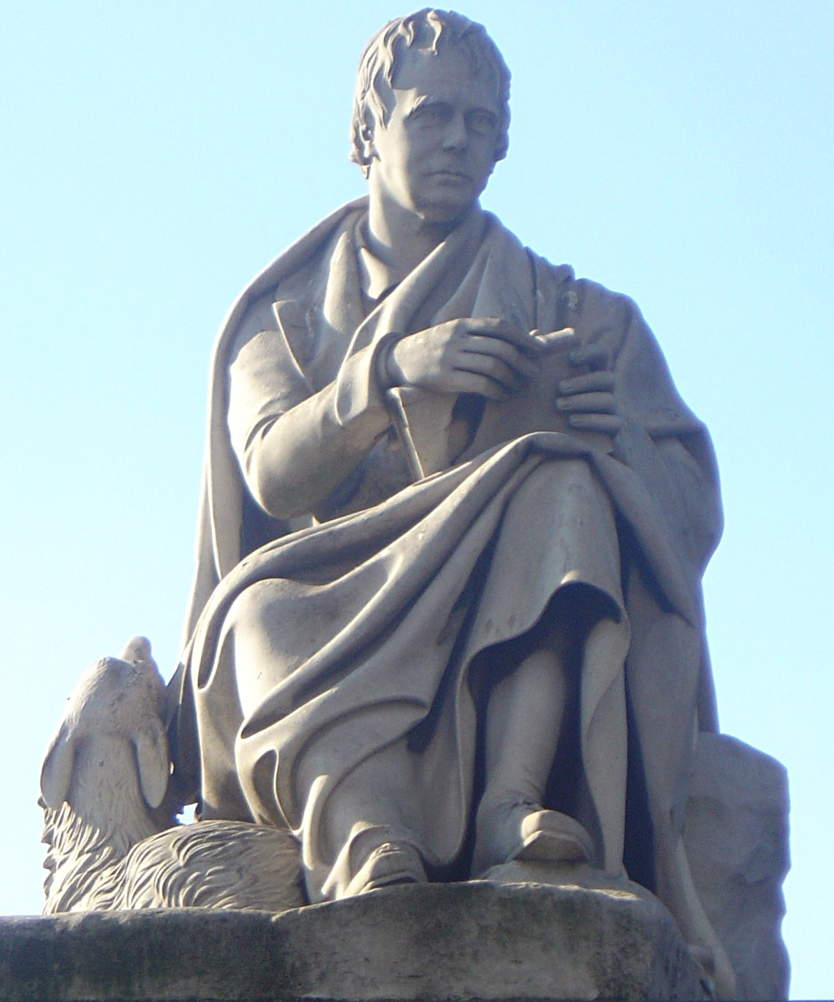 Edinburgh, Walter Scott monument